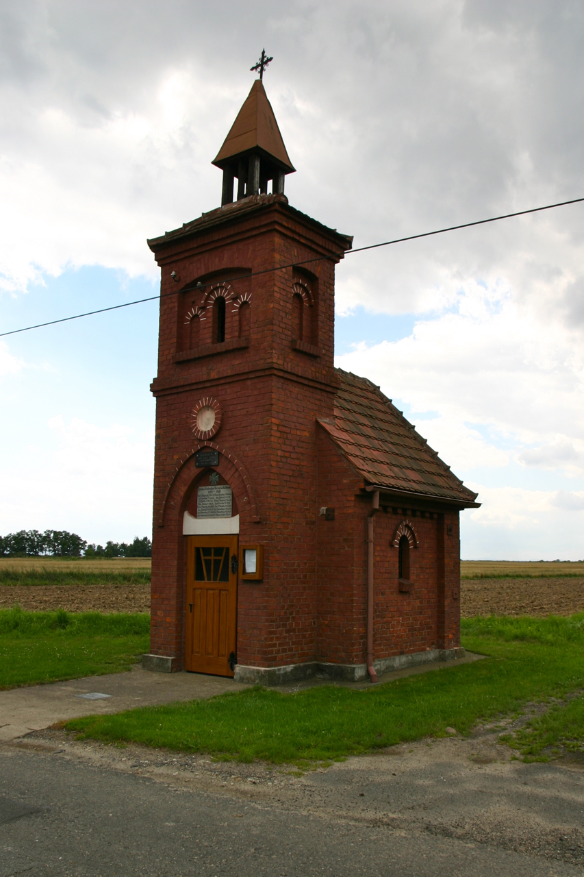 Górka Prudnicka (dodatkowa nazwa w j. niem. Ernestinenberg) – wieś w Polsce położona w województwie opolskim, w powiecie prudnickim, w gminie Biała.